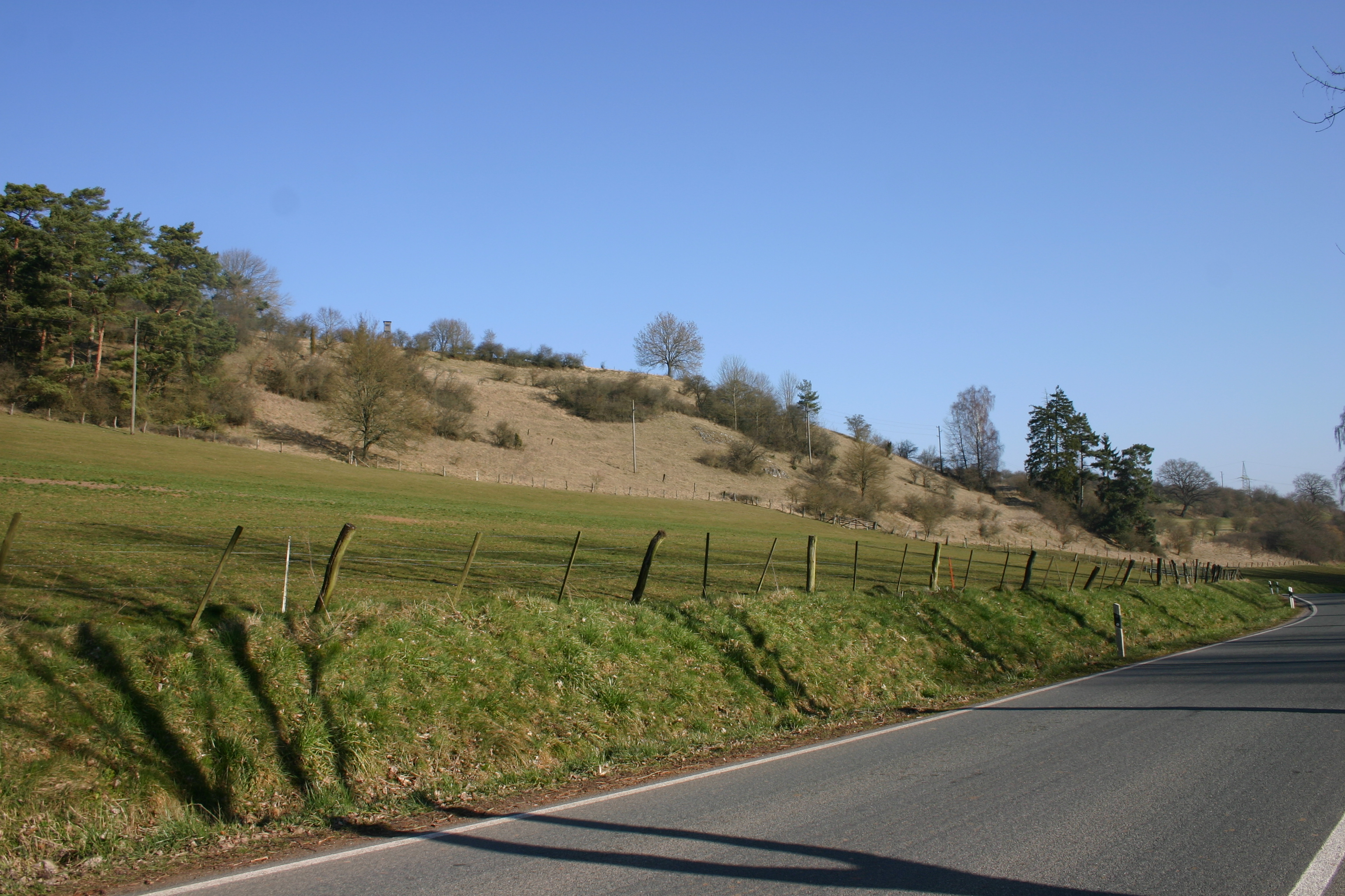 Blick von der Landstraße von Canstein nach Udorf auf einen Teil der östlichen Teilfläche des Naturschutzgebiets „Udorfer Mühle“ bei Marsberg-Udorf im Hochsauerlandkreis (NRW).